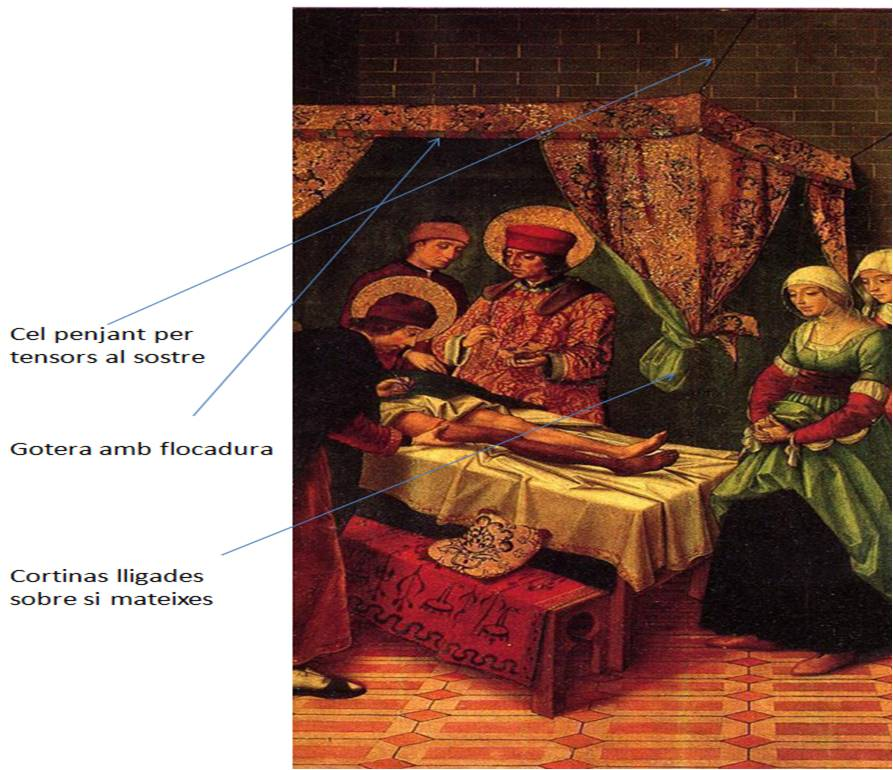 Llit